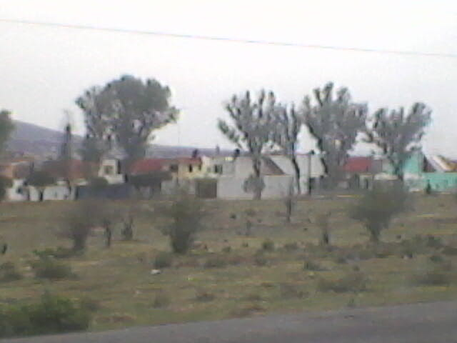 Vista de una unidad habitacional de Ciudad Sahagún